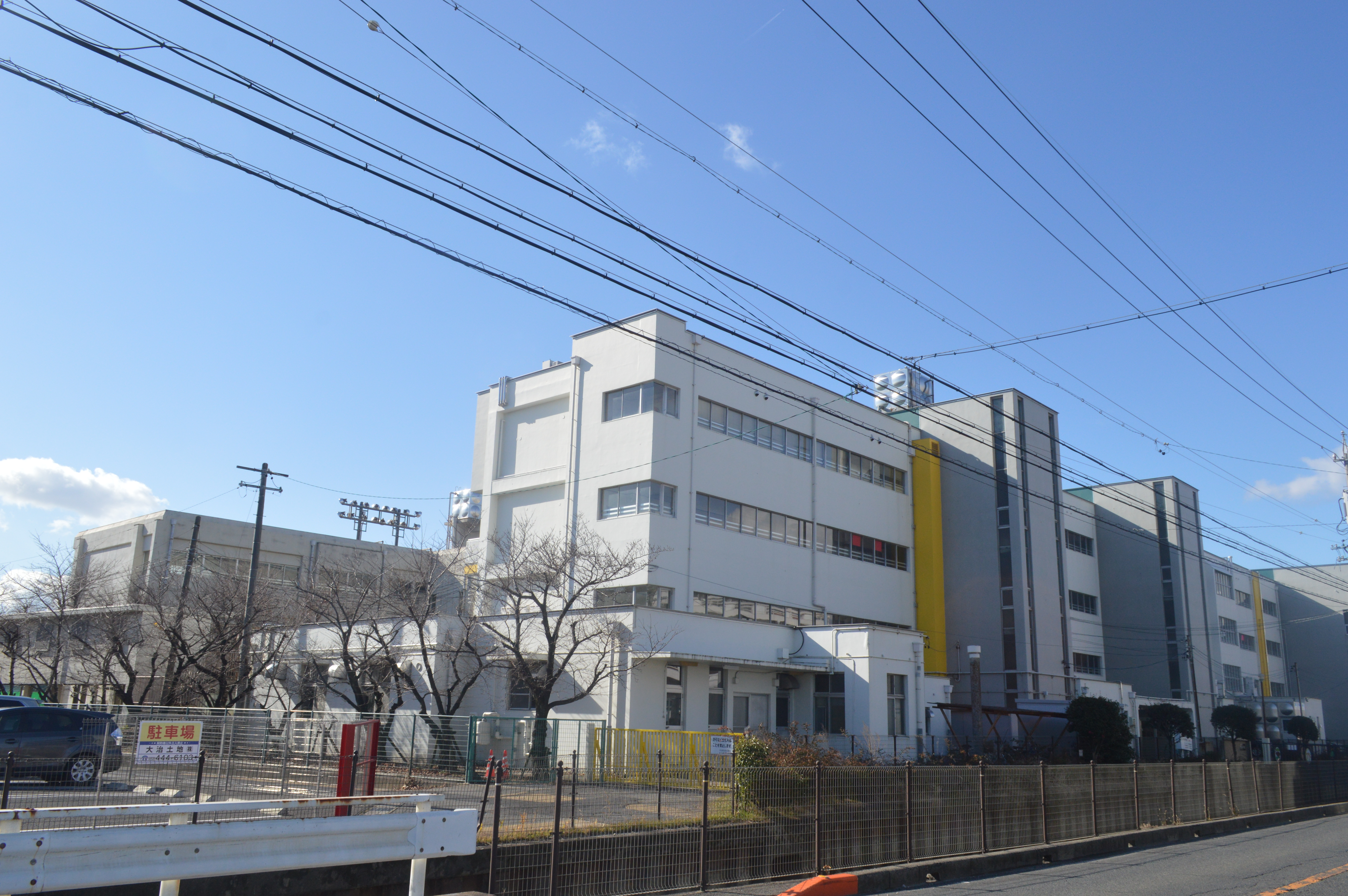 愛知県海部郡大治町にある大治町立大治中学校。